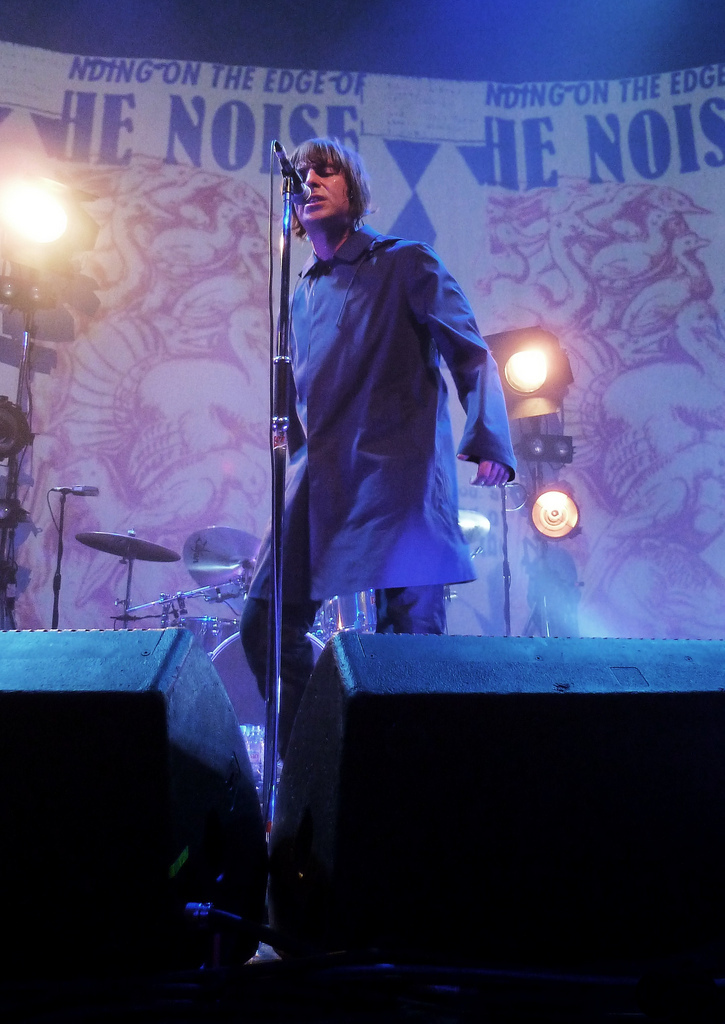 Beady Eye @ Paradiso